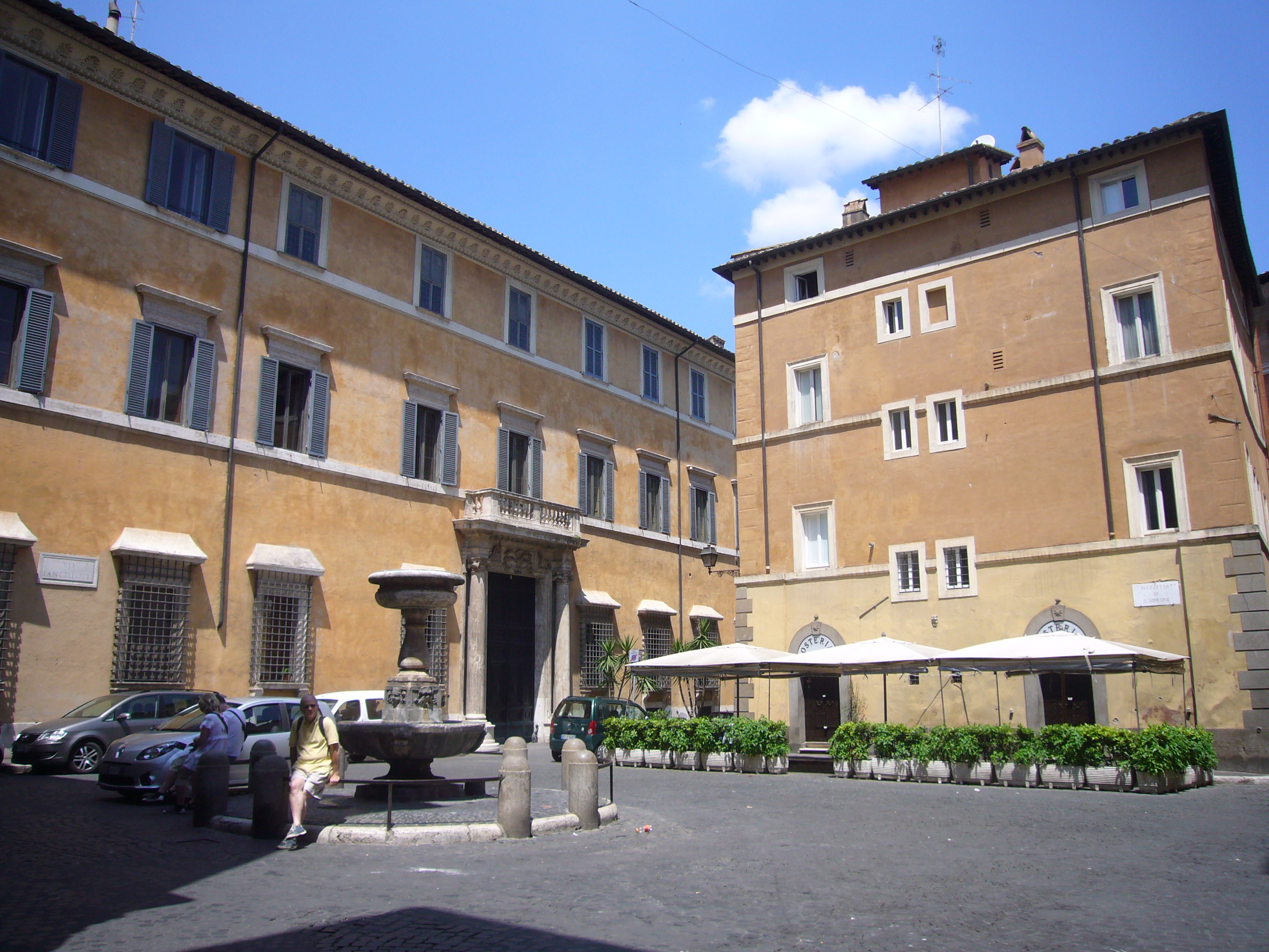 Roma, piazzetta san Simeone ai Coronari. A sinistra, palazzo Lancellotti